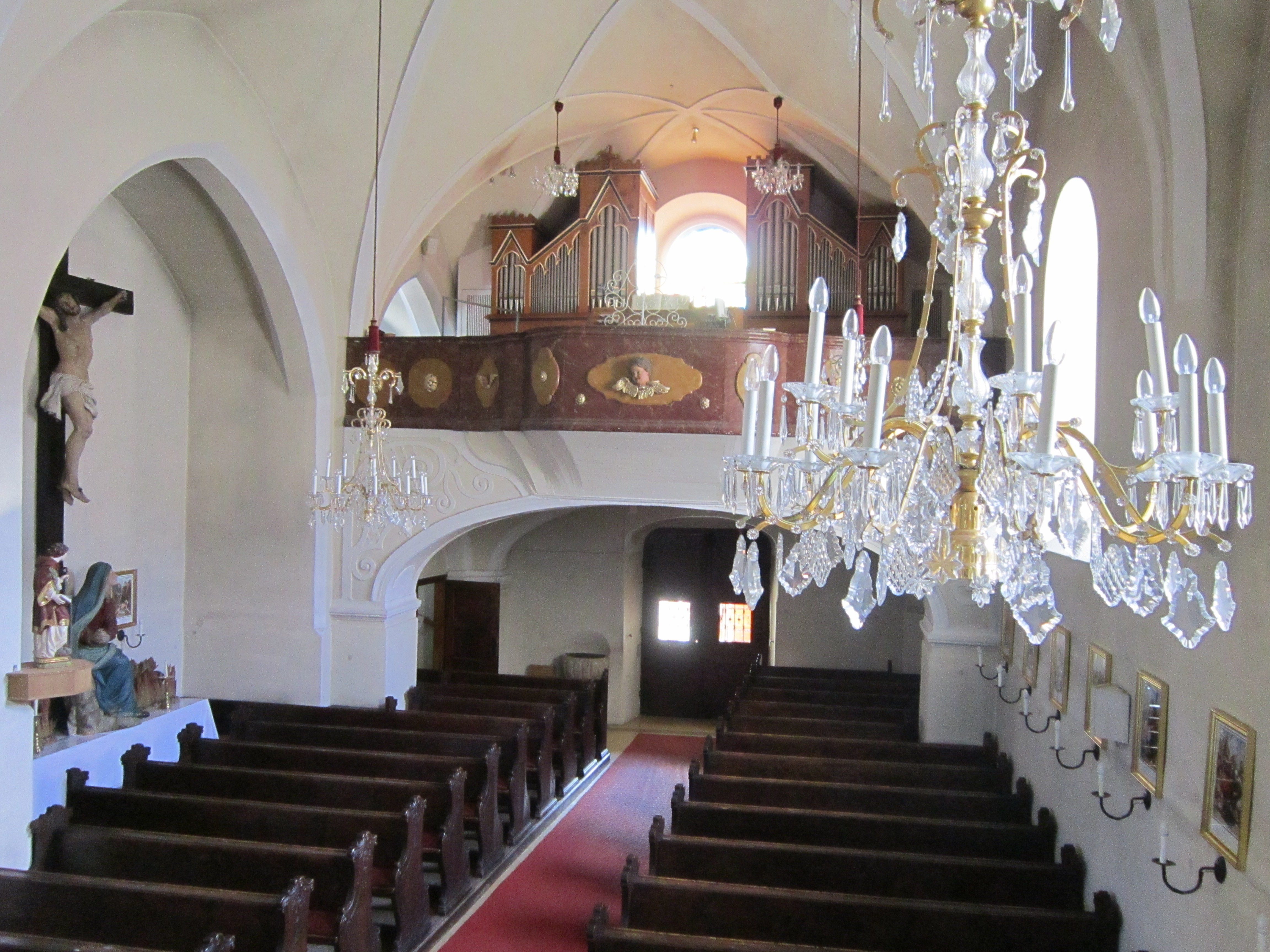 Kath. Pfarrkirche hl. Laurentius, Friedhof und Mauern